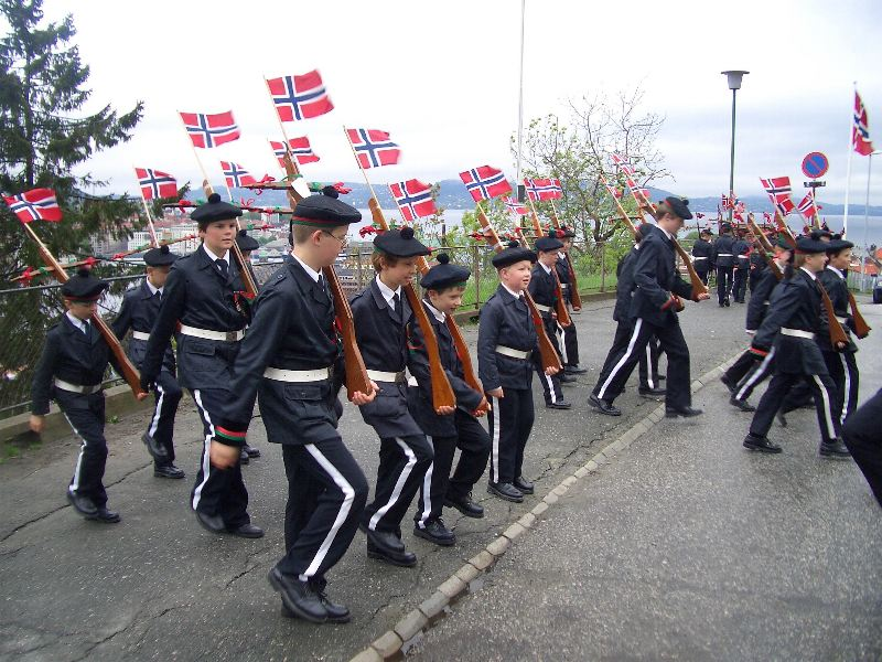 Skansens Bataljon